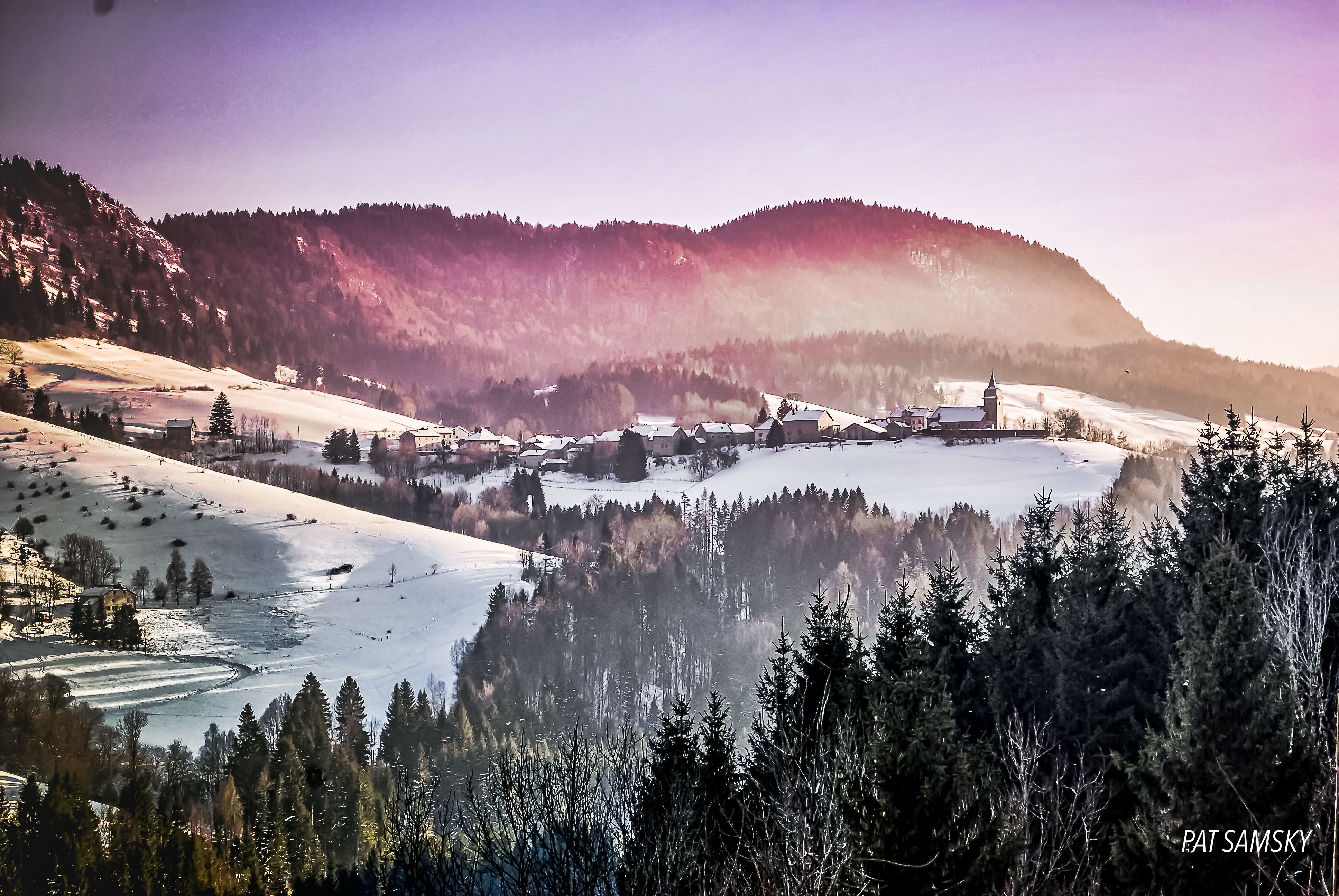 photo